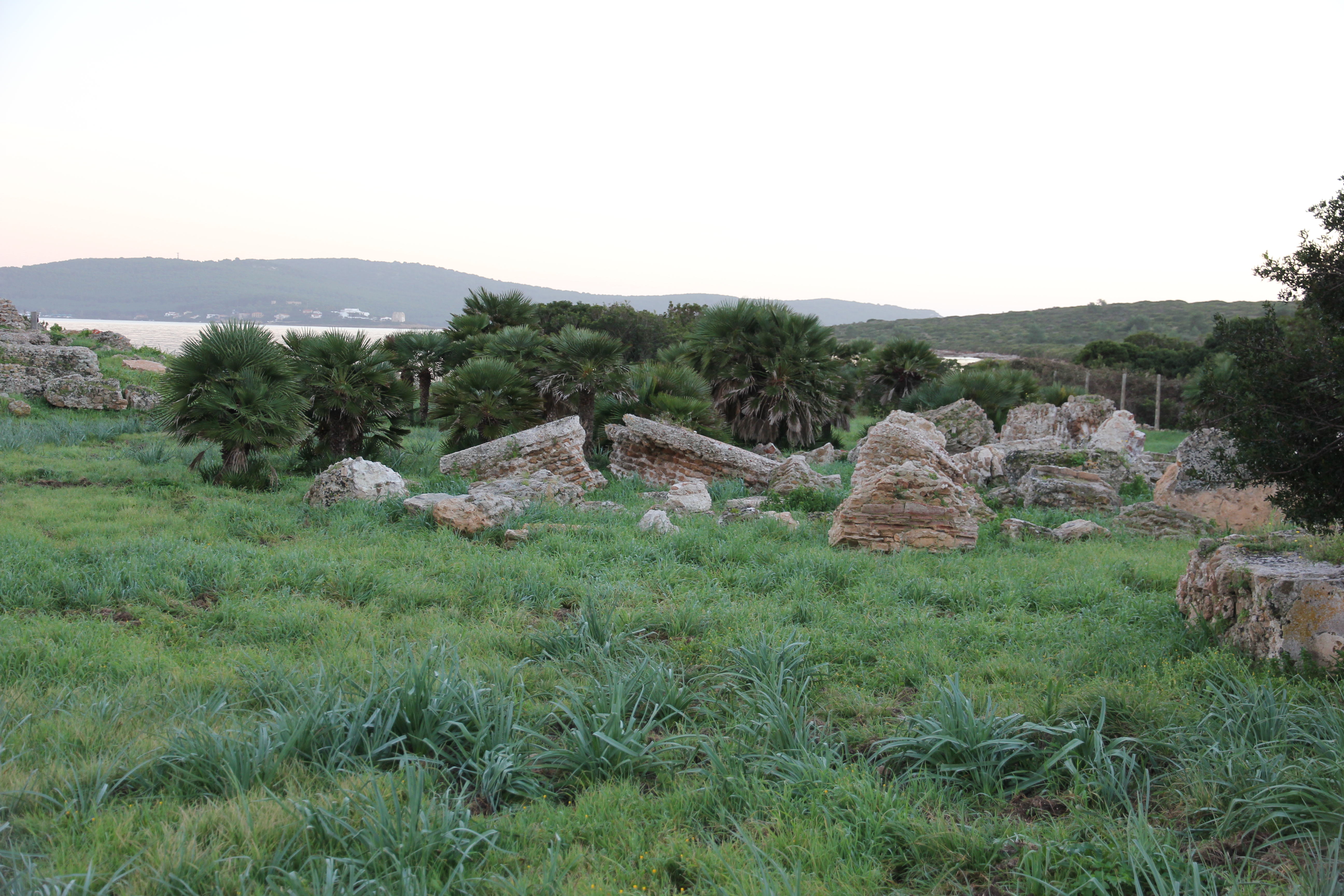 Alghero - Villa di Sant'Imbenia